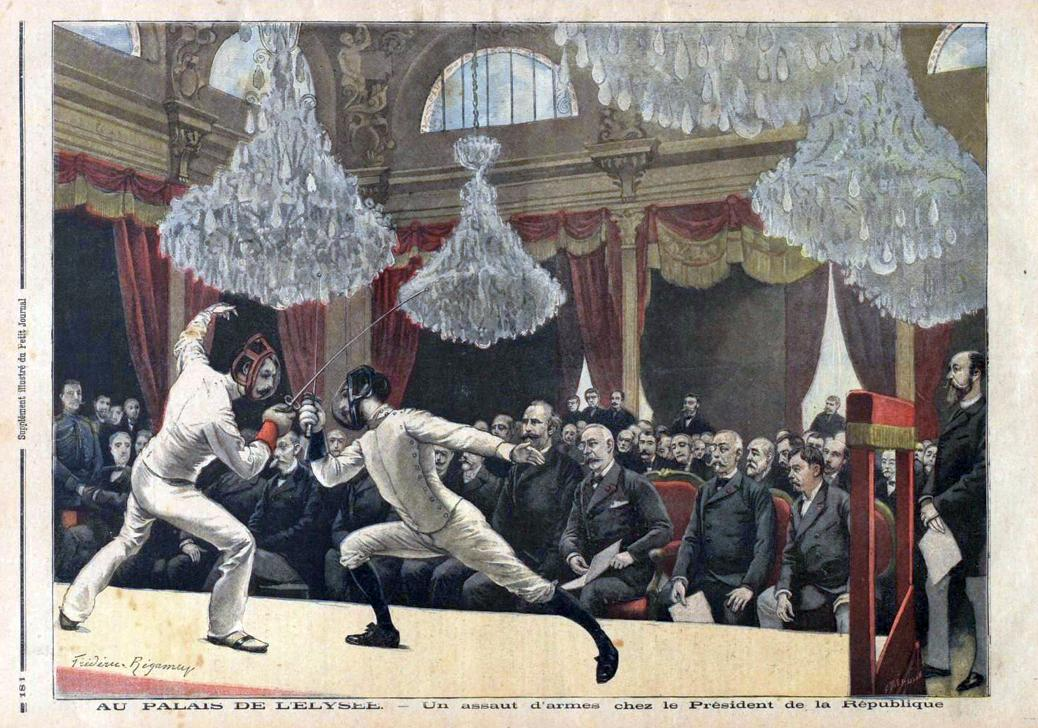 Le Petit Journal Illustré, 09/06/1895